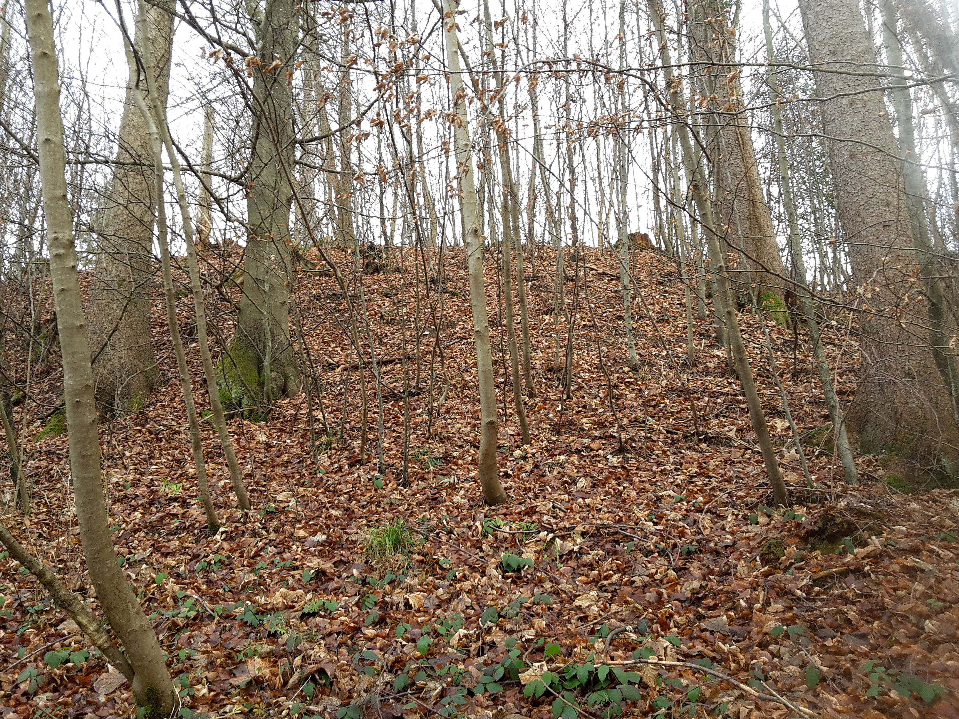 Höchster Punkt des Hohbüels, Urdorf, Kanton Zürich